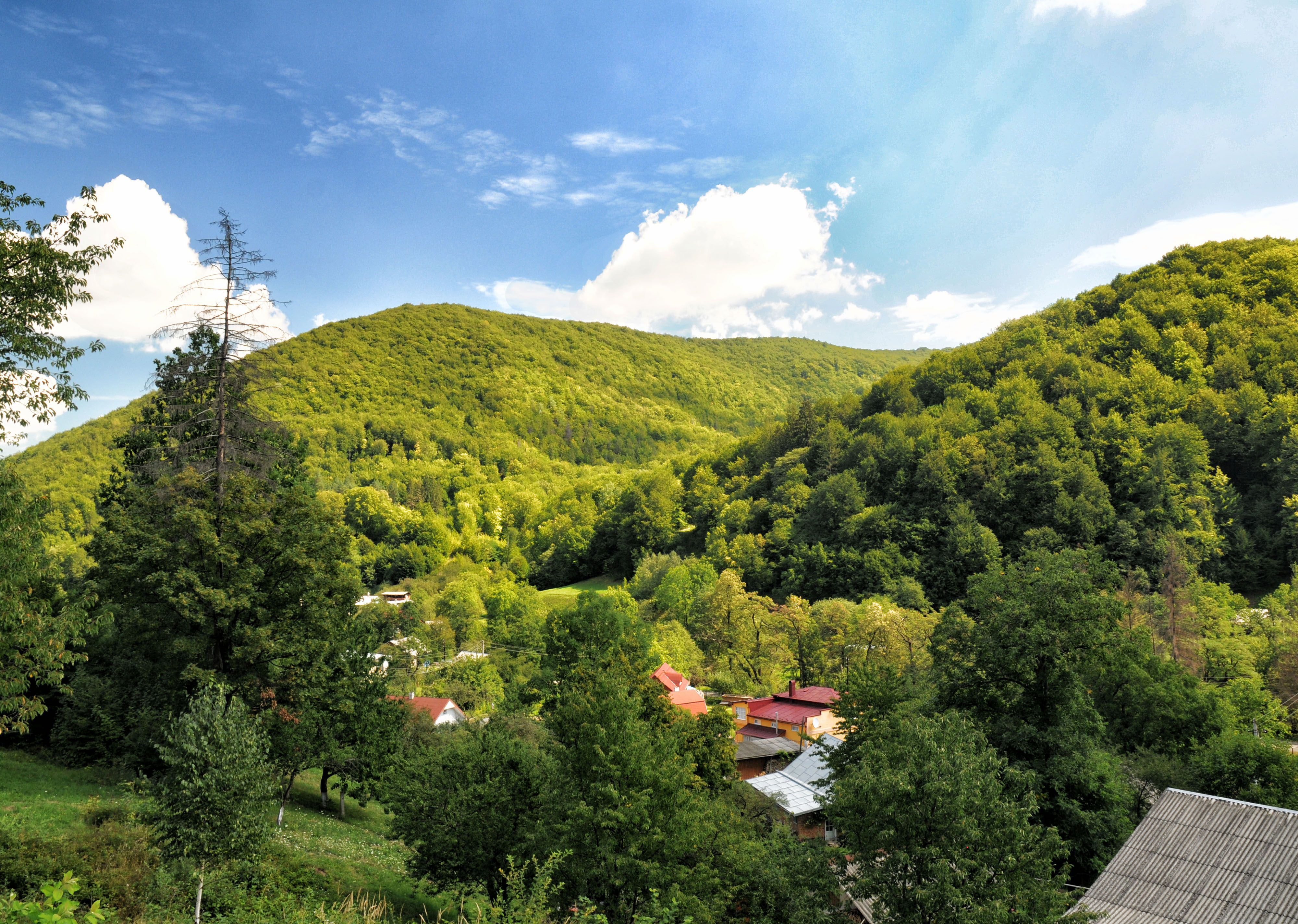 НПП "Вижницький", с.Виженка